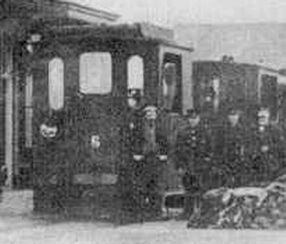 Locomotief nr. 6 "Coevorden van de Dedemsvaartsche Stoomtramweg-Maatschappij, fragment van :Afbeelding:Repro van DSM-station Coevorden 1906.jpg. Deze afbeelding is een reproductie van een ansichtkaart van 1906 waarvan de maker onbekend. Aangezien reproducties niet creatieve herdrukken zijn kan de afbeelding gerekend worden tot het publieke domein.